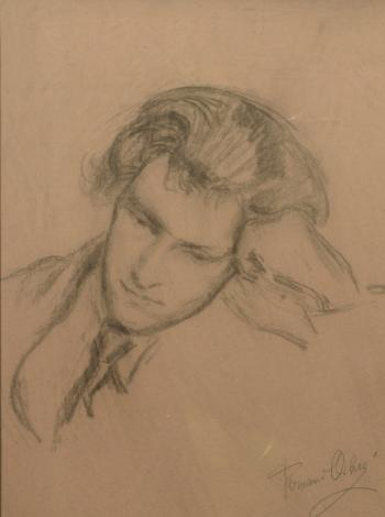 Fernand Ochsé: Arthur Honegger. Signierte Fotografie der Zeichnung. Widmung an Richard Pindle Hammond Paris (36, avenue de Châtillon) : B. M. et C.o phot